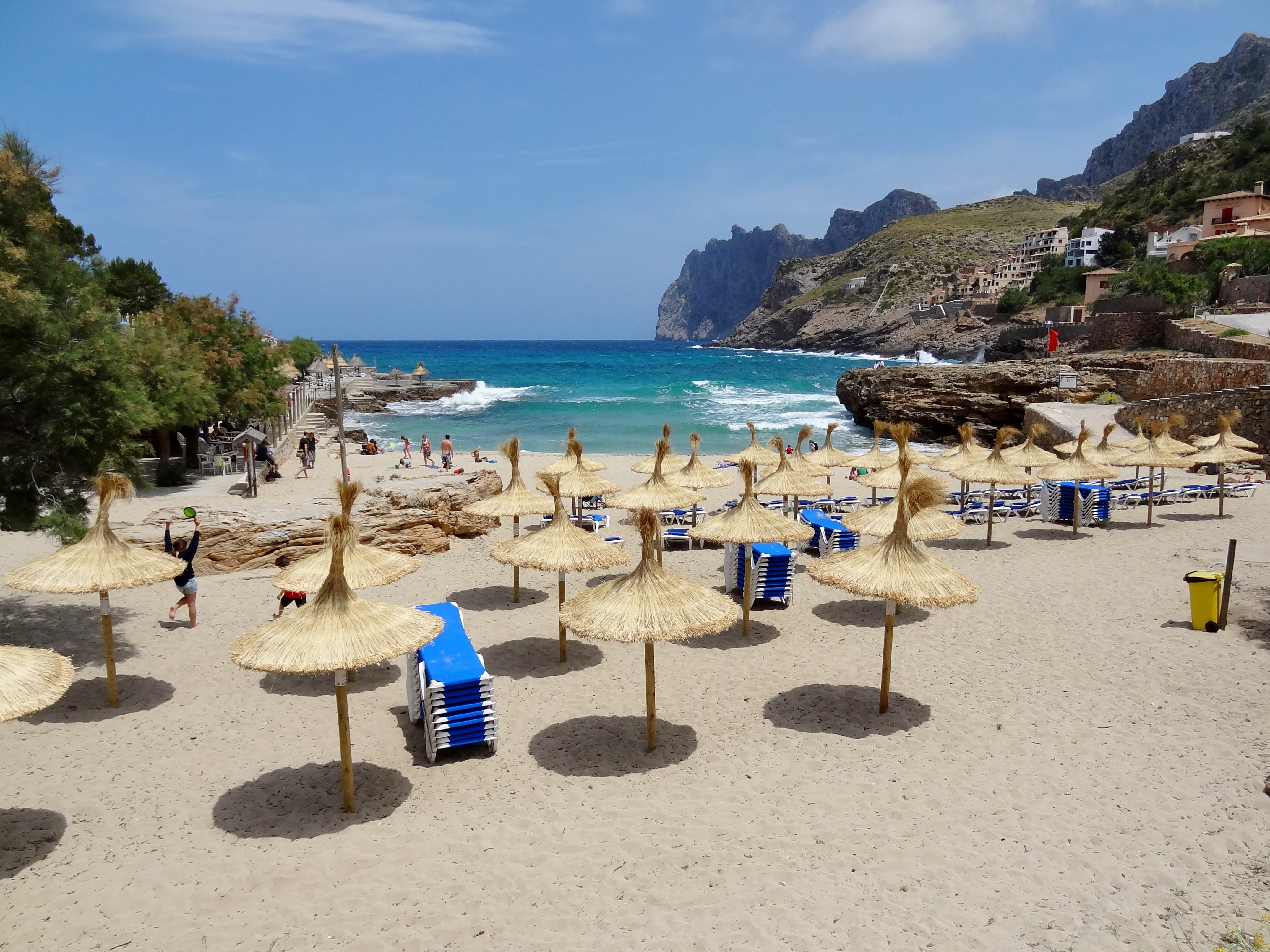 Cala Molins im Ort Cala Sant Vicenç, Gemeinde Pollença, Mallorca, Spanien